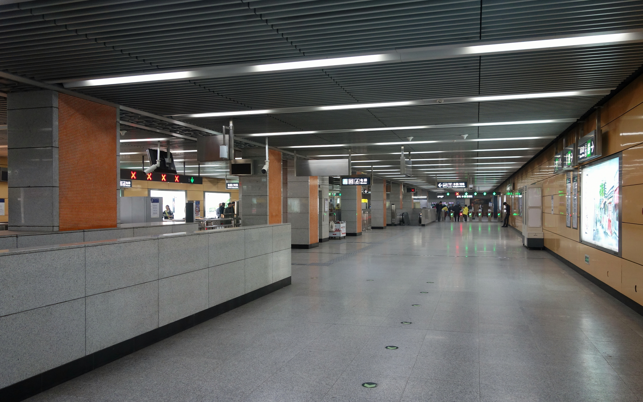 北京地铁4号线北宫门站的站厅层